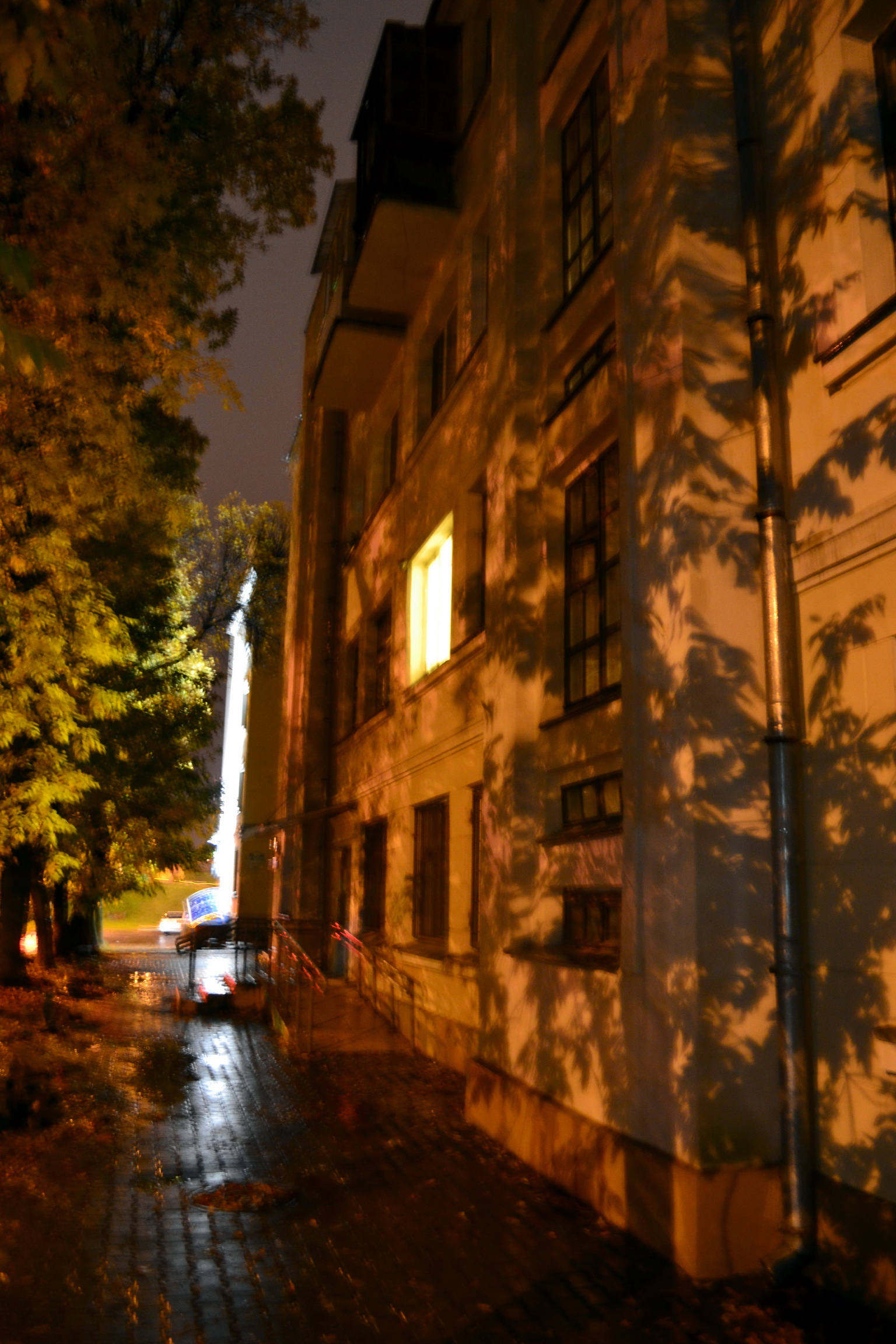 Беларуская (тарашкевіца): м. Менск, зав. Дабрамысьленскі, 3 This is a photo of Belarusian heritage monument. Reference number: невядомы ( WLM)